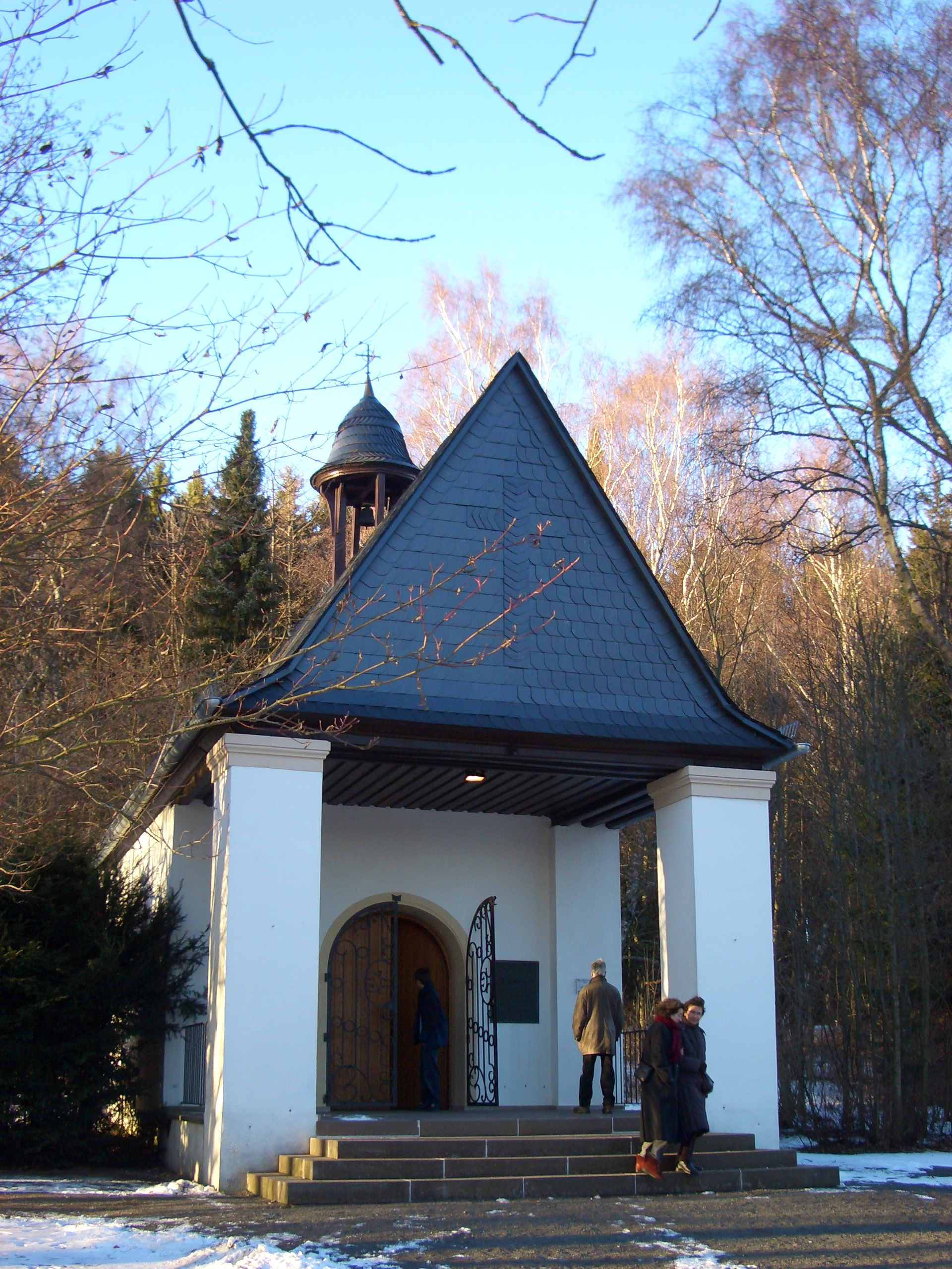 SS-Sonderlager/KZ Hinzert, cemetery chapel